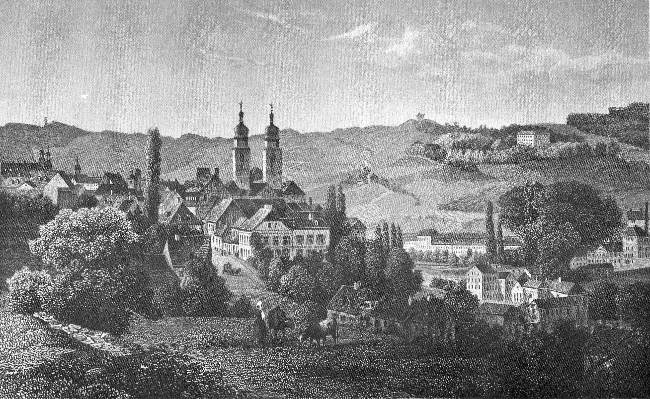 Stahlstich einer historischen Ansicht von Plauen im Vogtland, Sachsen. In der Bildmitte befindet sich die Johanniskirche.